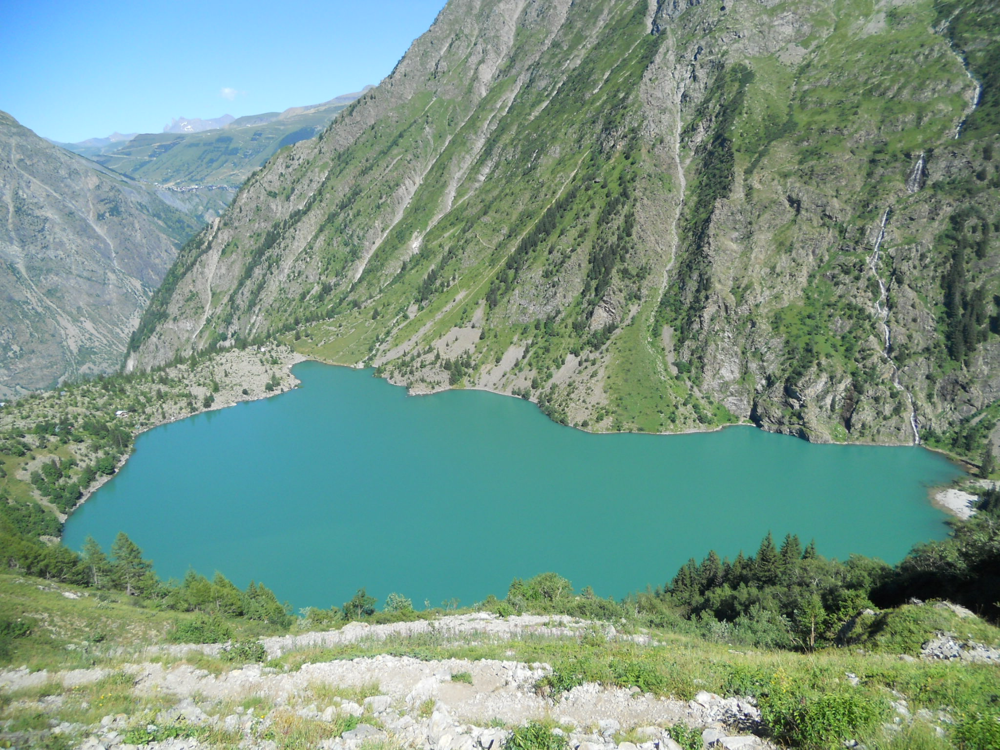 Le Lac Lauvitel depuis le chemin menant au lac de Plan Vianney